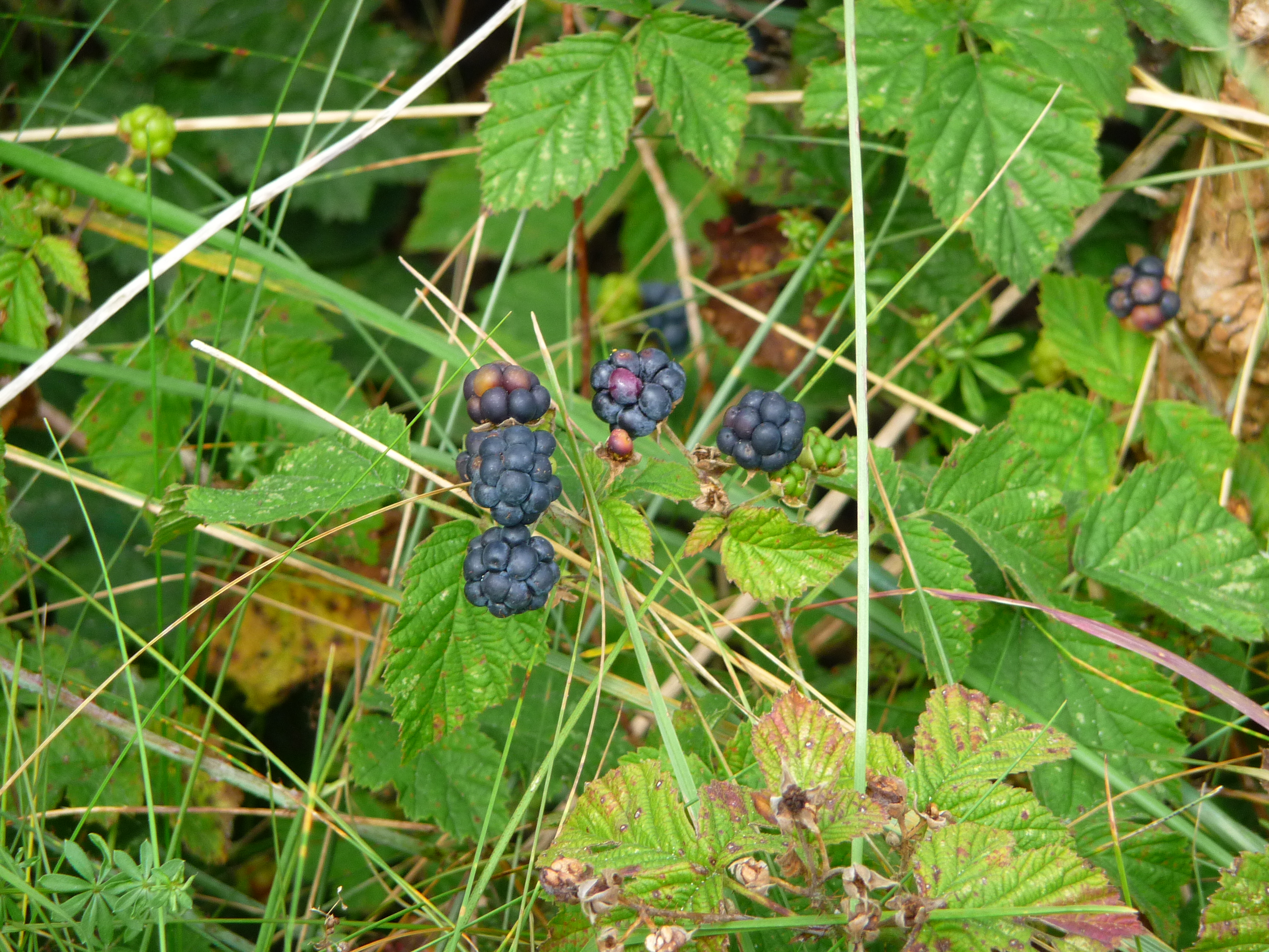 Kratzbeere (Rubus caesius), fotografiert auf der ostfriesischen Nordseeinsel Juist (Niedersachsen, Deutschland)